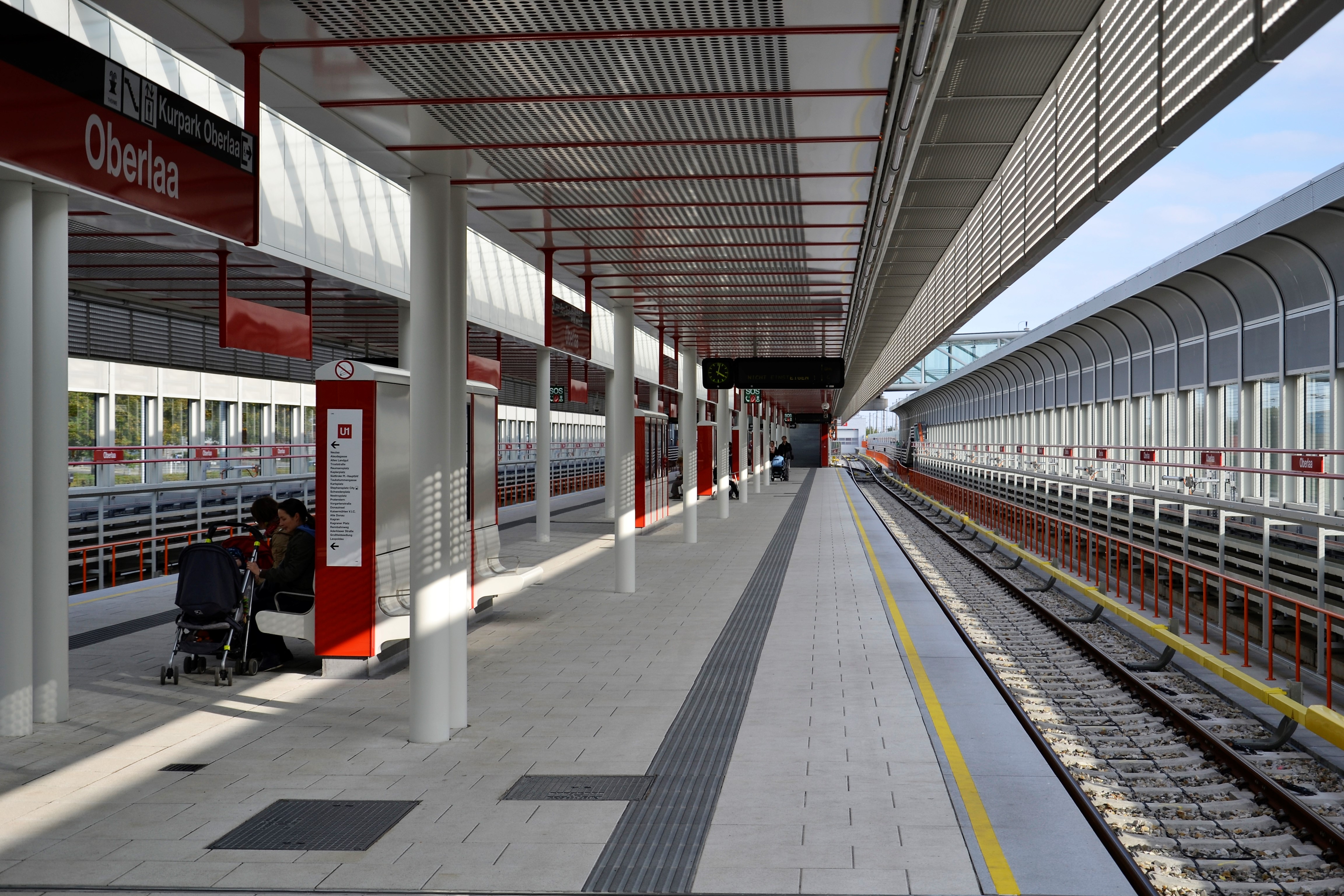 Die U-Bahn-Station Oberlaa ist eine U-Bahn-Station der U-Bahn-Linie U1 in Wien. Auf dieser Aufnahme ist der Bahnsteig Anfang Oktober 2017, knapp einen Monat nach der Eröffnung, zu sehen.